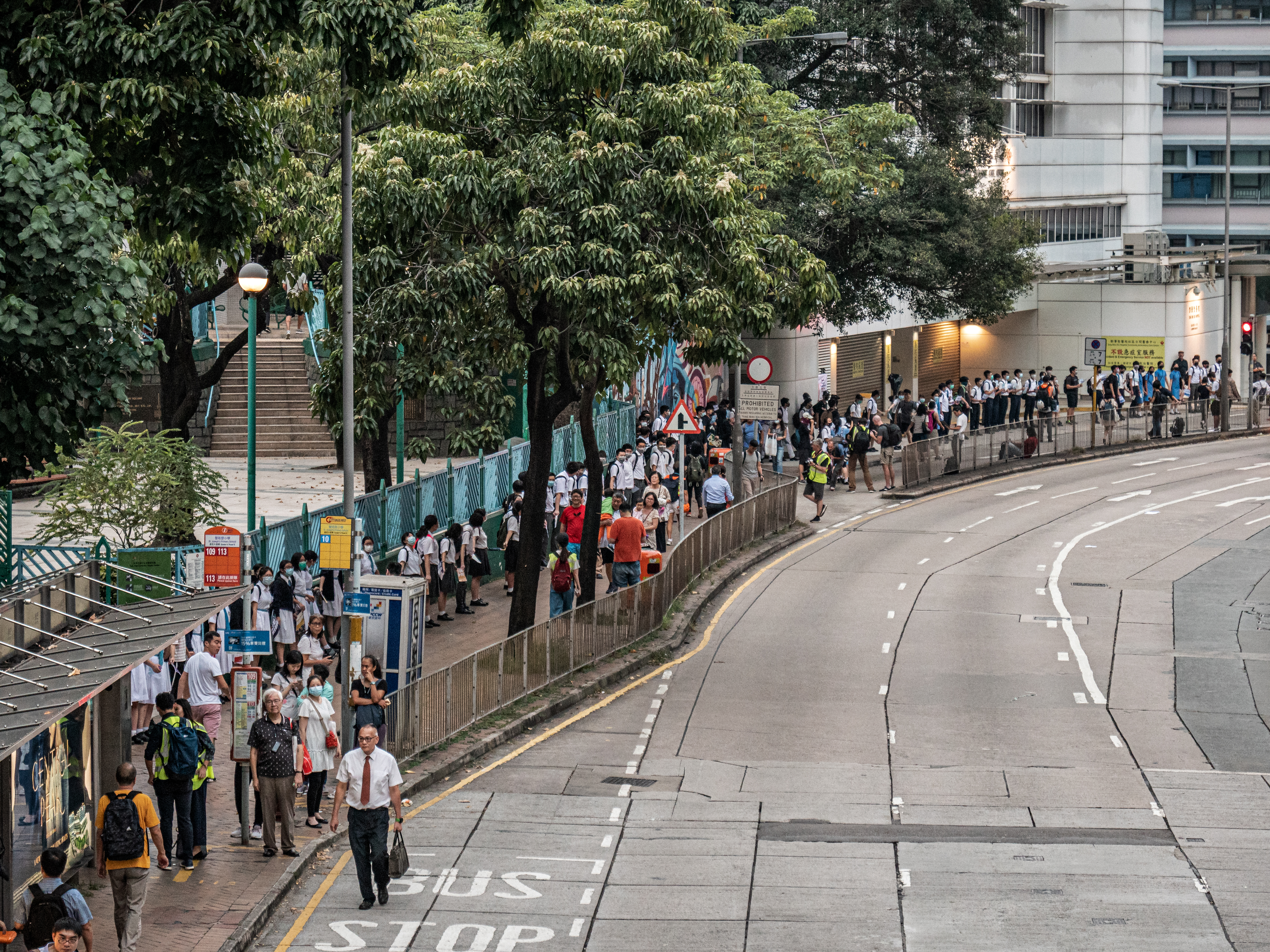 20190926 Wan Chai